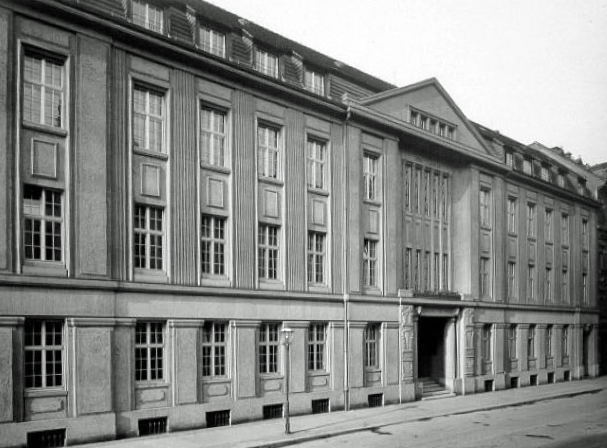 Die Hochschule für Frauen zu Leipzig, erbaut 1913, heute Henriette-Goldschmidt-Schule in der Goldschmidtstraße